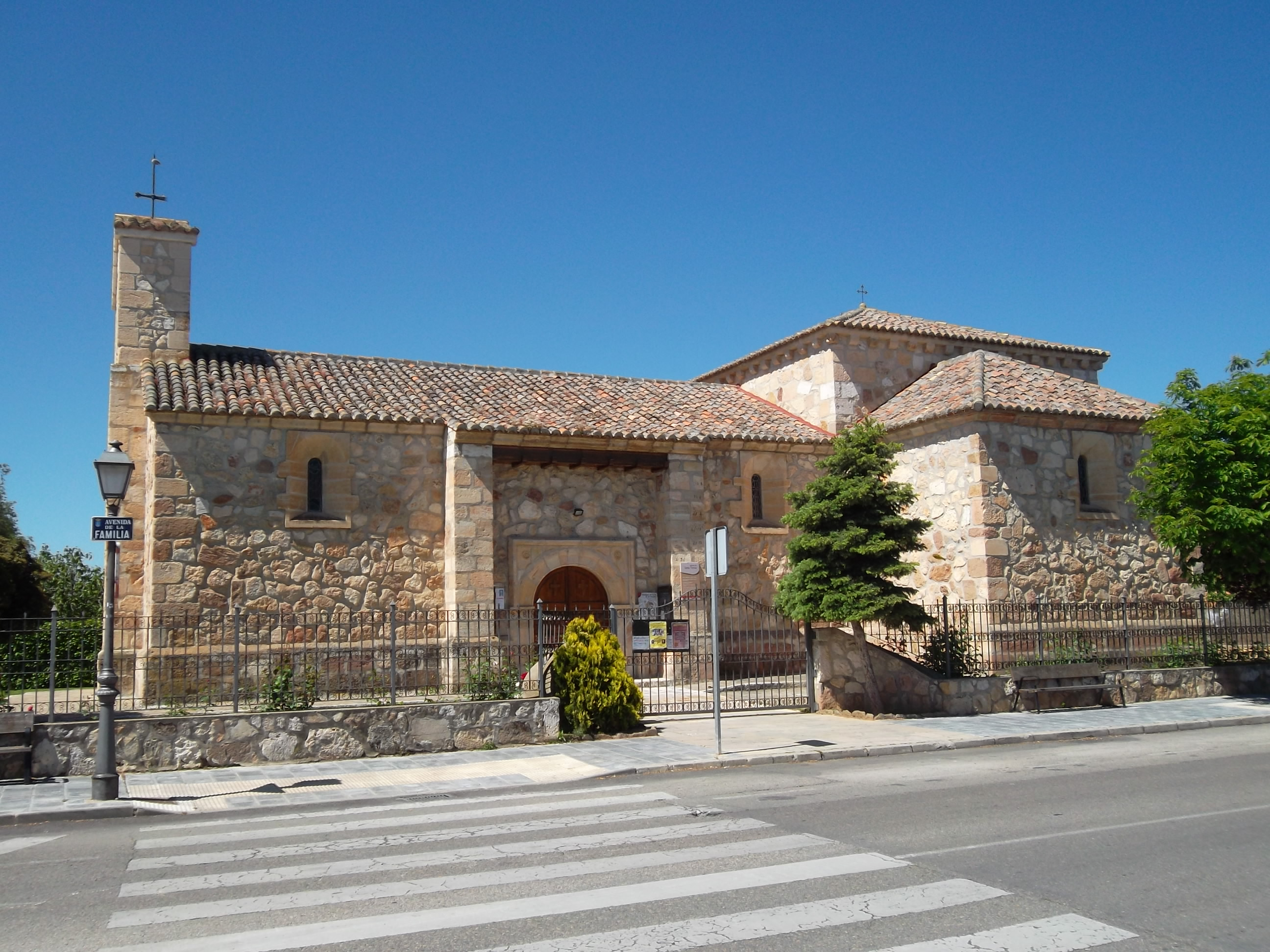 Azuqueca-Iglesia de Santa Teresa de Jesús, es la antigua iglesia de San Salvador, obra del románico tardío (s.XVII) fué desmontada en la localidad de Alcorlo, hoy anegada por un embalse y remontada piedra sobre piedra en el barrio de Asfin (Azuqueca) entre los años 1982 y 1987.